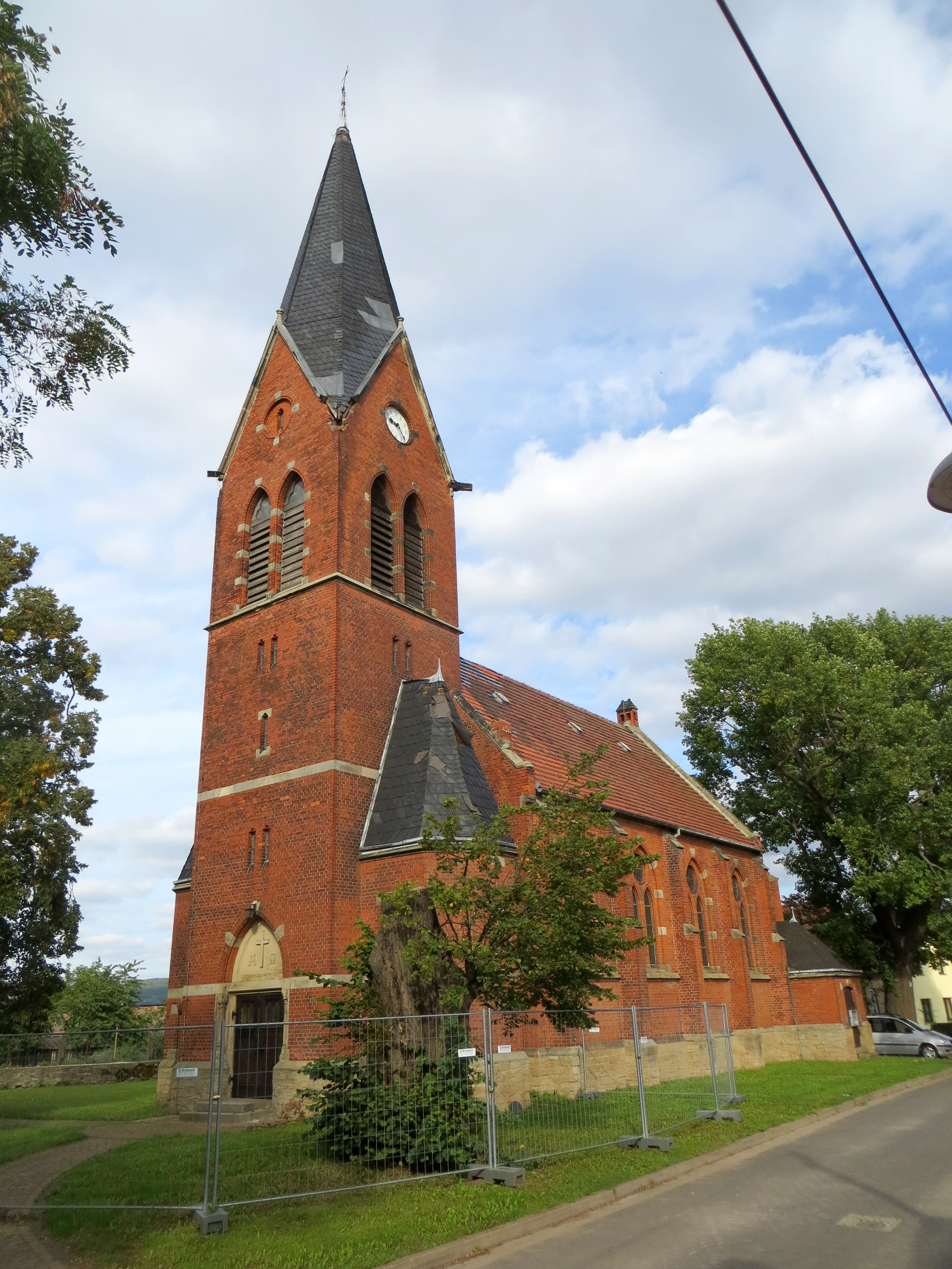 Thürungen (Kelbra) – Kirche St. WigbertiThis is a photograph of an architectural monument. 84699Fälschlicherweise in der Denkmalliste als St. Trinitatis bezeichnet